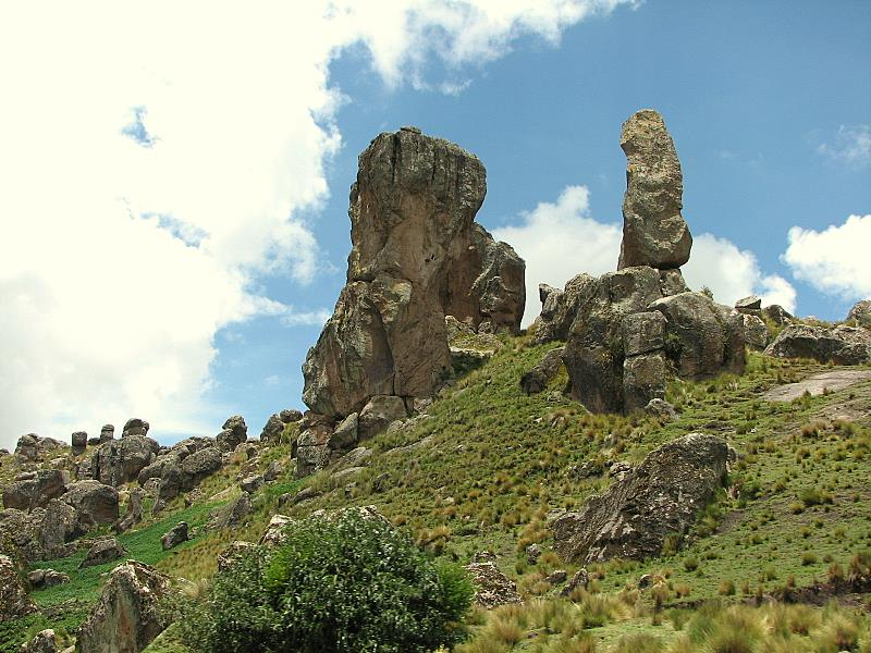 Alrededores de Huancavelica. Licensing